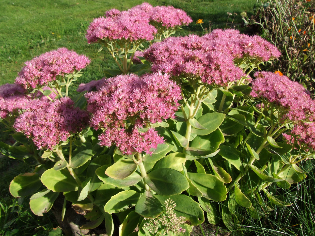 Sedum spectabile (pl. rozchodnik okazały)